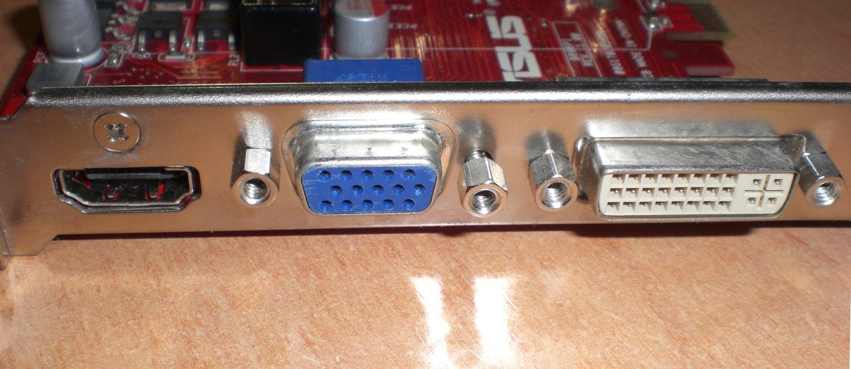 Fotografía de las principales salidas de una tarjeta gráfica